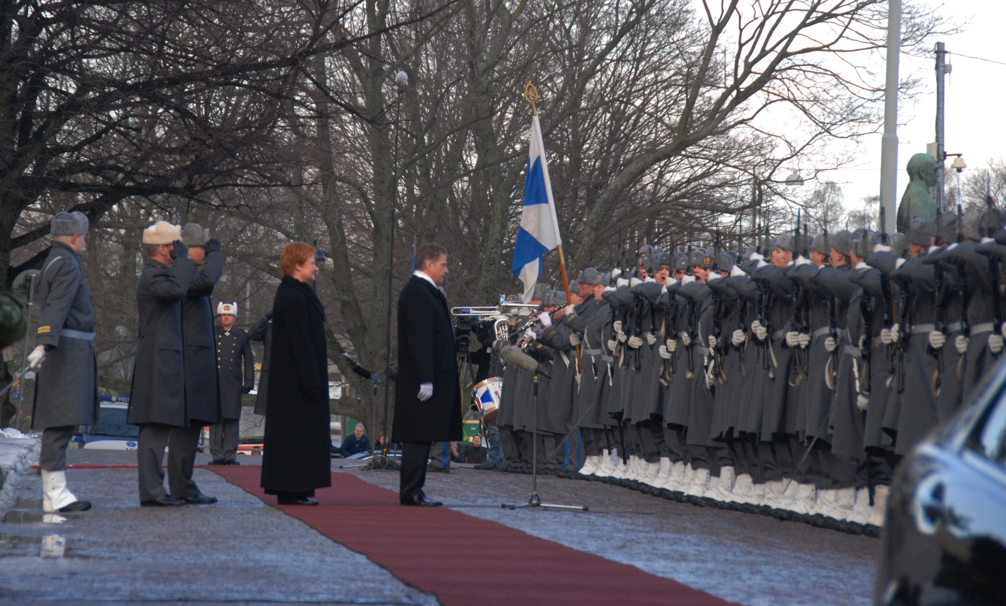 Tasavallan uusi presidentti Sauli Niinistö tarkastaa kunniankomppanian. Sotilaat Kaartin jääkärirykmentin sotilaspoliisikommppaniasta.